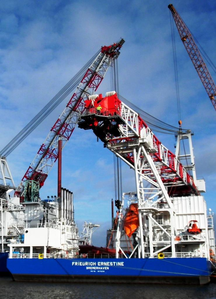 Errichterschiff Friedrich Ernestine